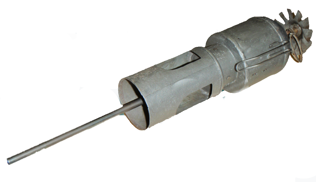 Granata da Fucile Excèlsior - Thèvenot P.2 versione da fucile della granata a mano nota come "Ballerina"